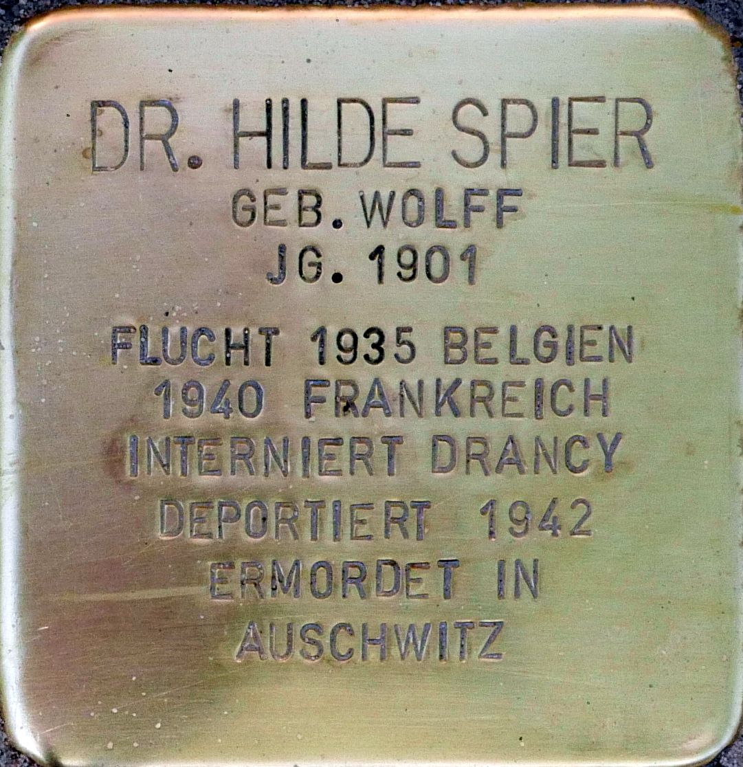 Stolperstein für Dr. Hilde Spier / Gleueler Str. 163 (Köln-Lindenthal)